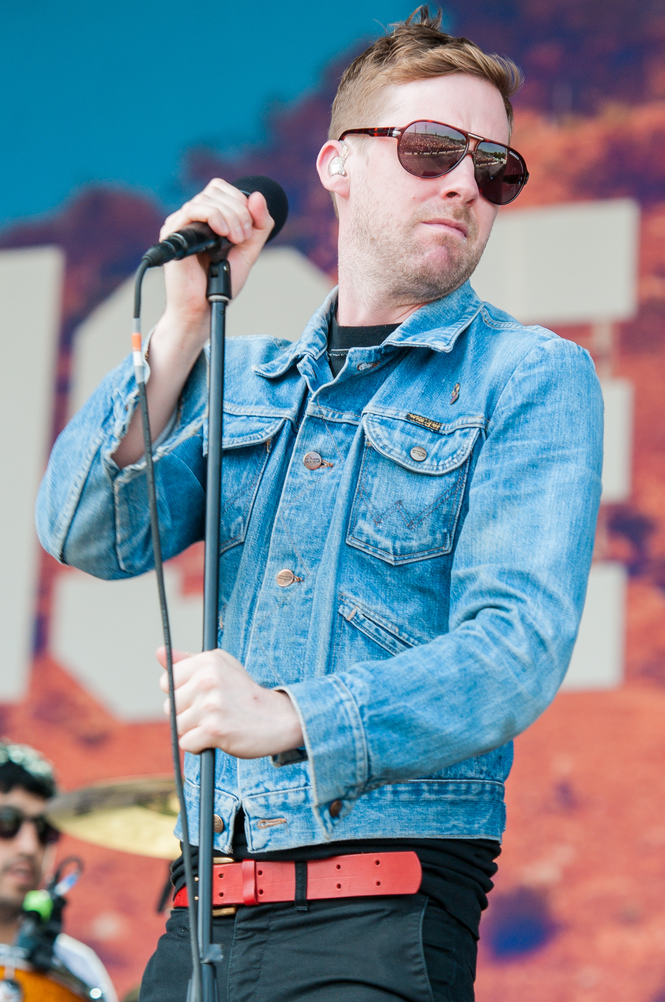 ARGO-Konzerte,Centerstage,Kaiser Chiefs,Konzert,Livekonzert,Livemusik,Musik,RiP,Ricky Wilson,Rock im Park 2014